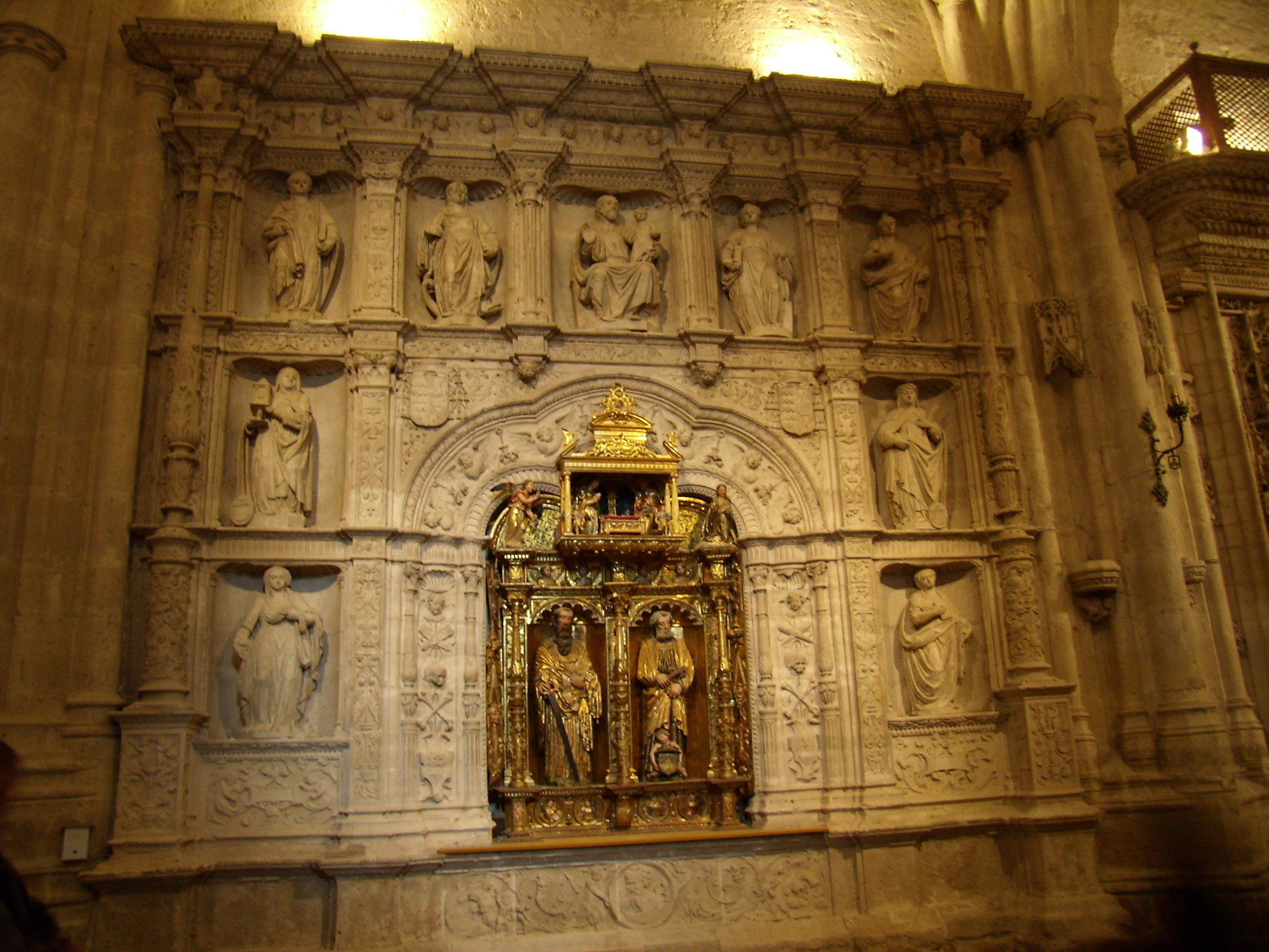 Transcoro plateresco de la Catedral de Palencia.